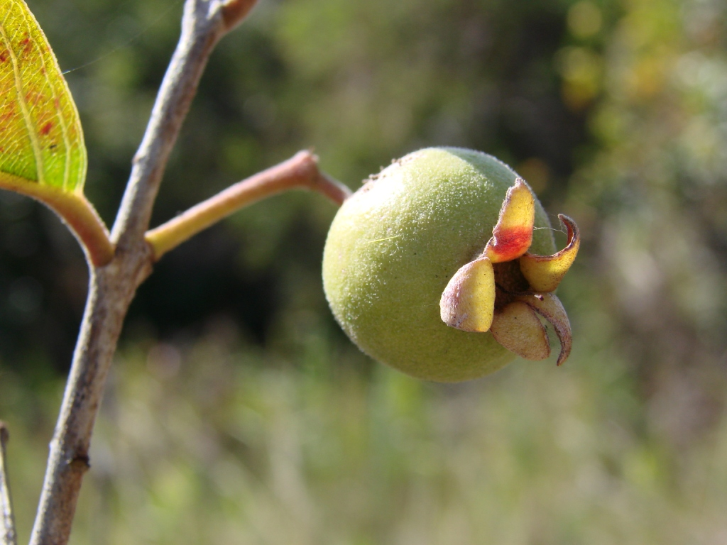 Psidium cinereum - MYRTACEAE Parque Nacional do Grande Sertão Veredas - Chapada Gaúcha - Minas Gerais - Brasil.